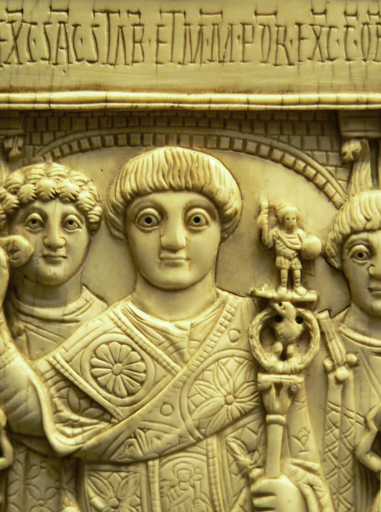 Feuillet d'un diptyque. Le consul Areobindus présidant les jeux, Constantinople, 506